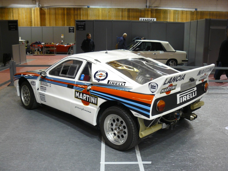 Retromobile 2012